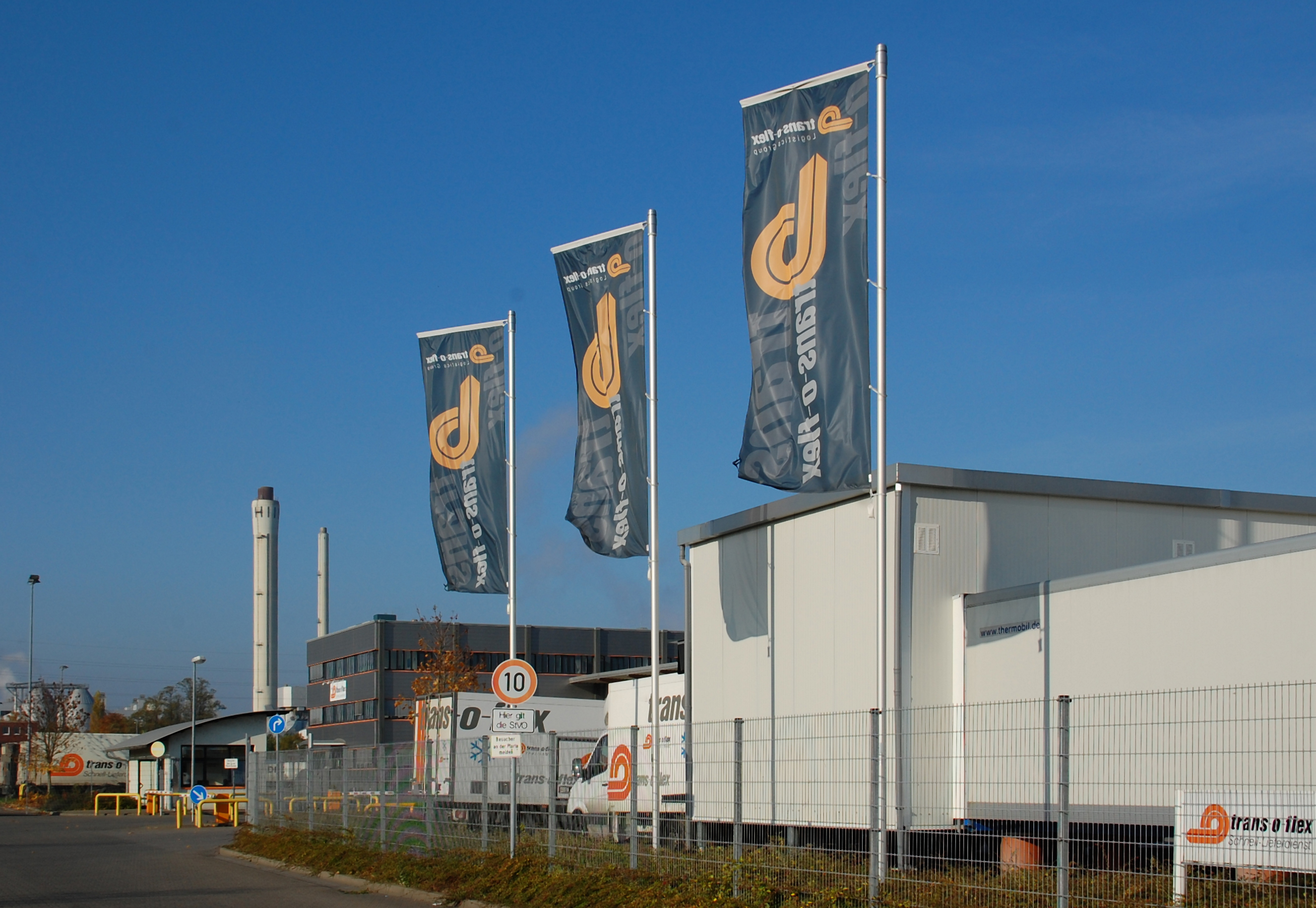 Flags of the logistic group trans-o-flex in Hürth-Knapsack